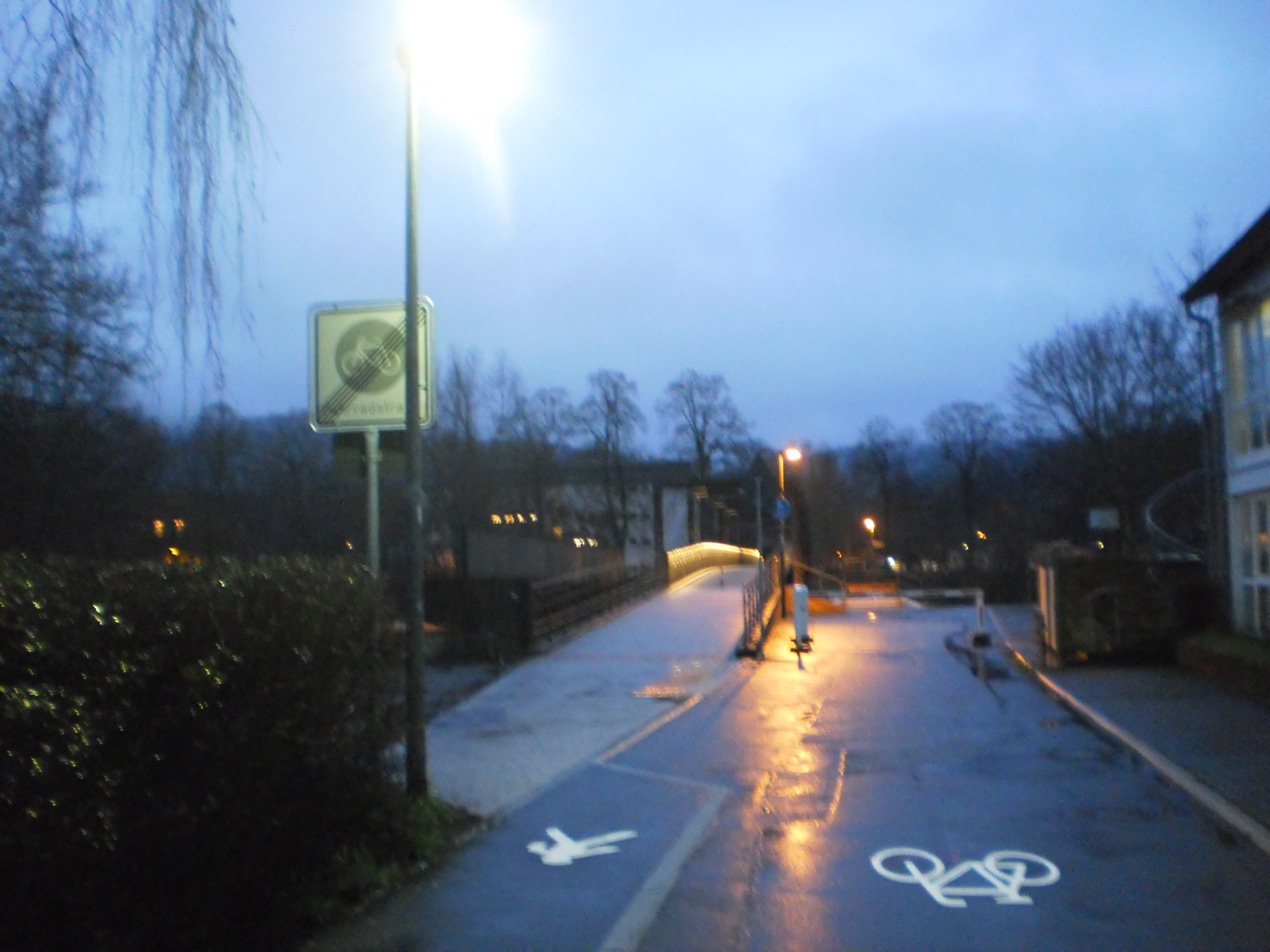 Der regennasse Hirsefeldsteg am Abend im Licht der LED-Strassenlaternen und der beleuchteten Brücke. Den Fussgänger*innen wird hier ein Schutzbereich neben der im Jahr 2016 neu eingerichteten Fahrradstrasse 'Auf der Weide' abmarkiert, die Blinden mit einem Blindenleitsystem von der Brücke (einem gemischten Rad-Fussweg) geradeaus auf den Gehweg neben der Fahrradstrasse geleitet. Die trotz der spürbaren Leitlinie für Blinde nahezu vollständige Bordsteinabsenkung auf 0-Niveau wird von den Radler*innen im sonst oft recht holprigen Marburg sicherlich begrüsst: Die tastbarer Schräge steigt kaum merklich an der Rampe zum Hirsefeldsteg an. Diese Brücke über die Lahn schliesst unmittelbar an die erste Fahrradstraße in Marburg an, die Ost- und West-Marburg im Radroutennetz südlich der Innenstadt verbinden soll. Die Steigung über die Konrad-Adenauer-Brücke oder über den Steg am Südbahnhof wird hier vermieden, auch die vom Autoverkehr des Umlandes oft schnell befahrenen Hauptstrassen. Auf der anderen Seite der Lahn schliesst unmittelbar der Lahntalradweg auf dem Trojedamm an, geradeaus in Verlängerung der Brücke befindet sich die Jugendherberge, etwas weiter südlich das Hallenbad Aquamar.